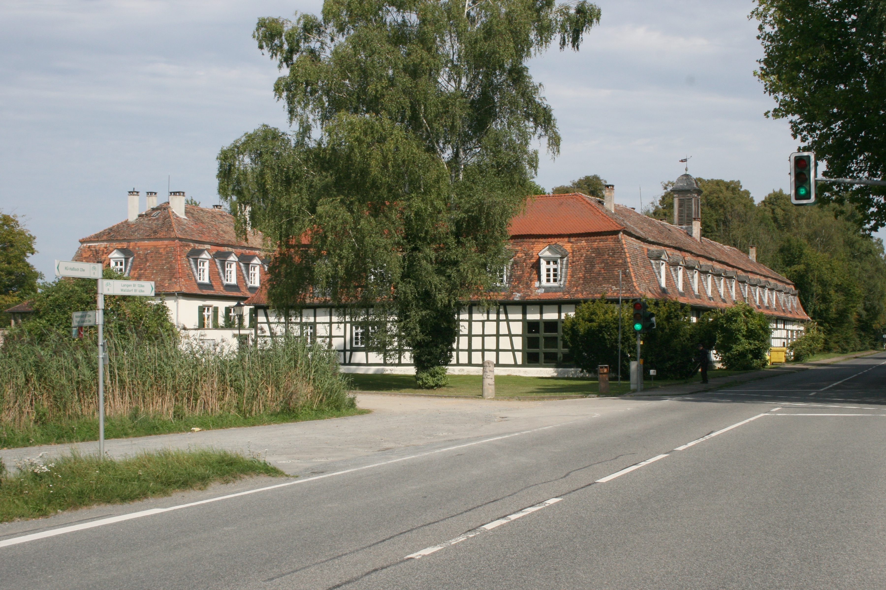 Jagdschloss Mönchbruch bei Mörfelden, Straßenseite.